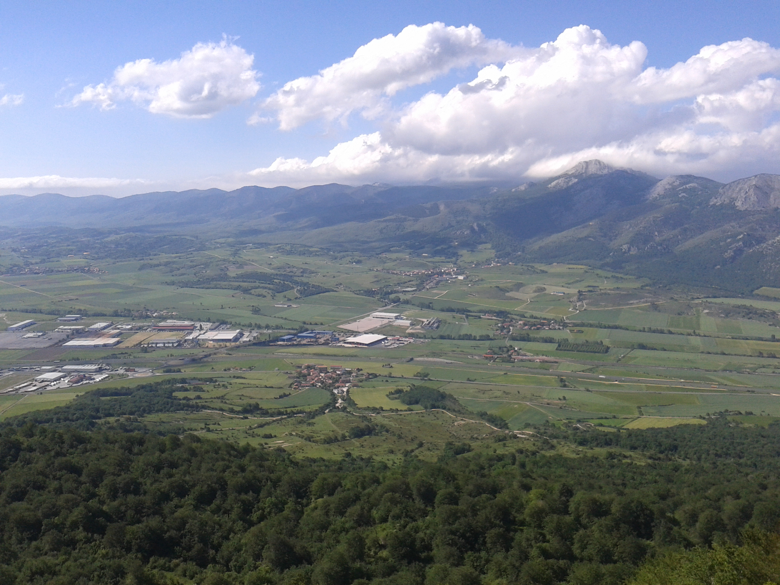 Durruma Donemiliaga, Egino eta Araia